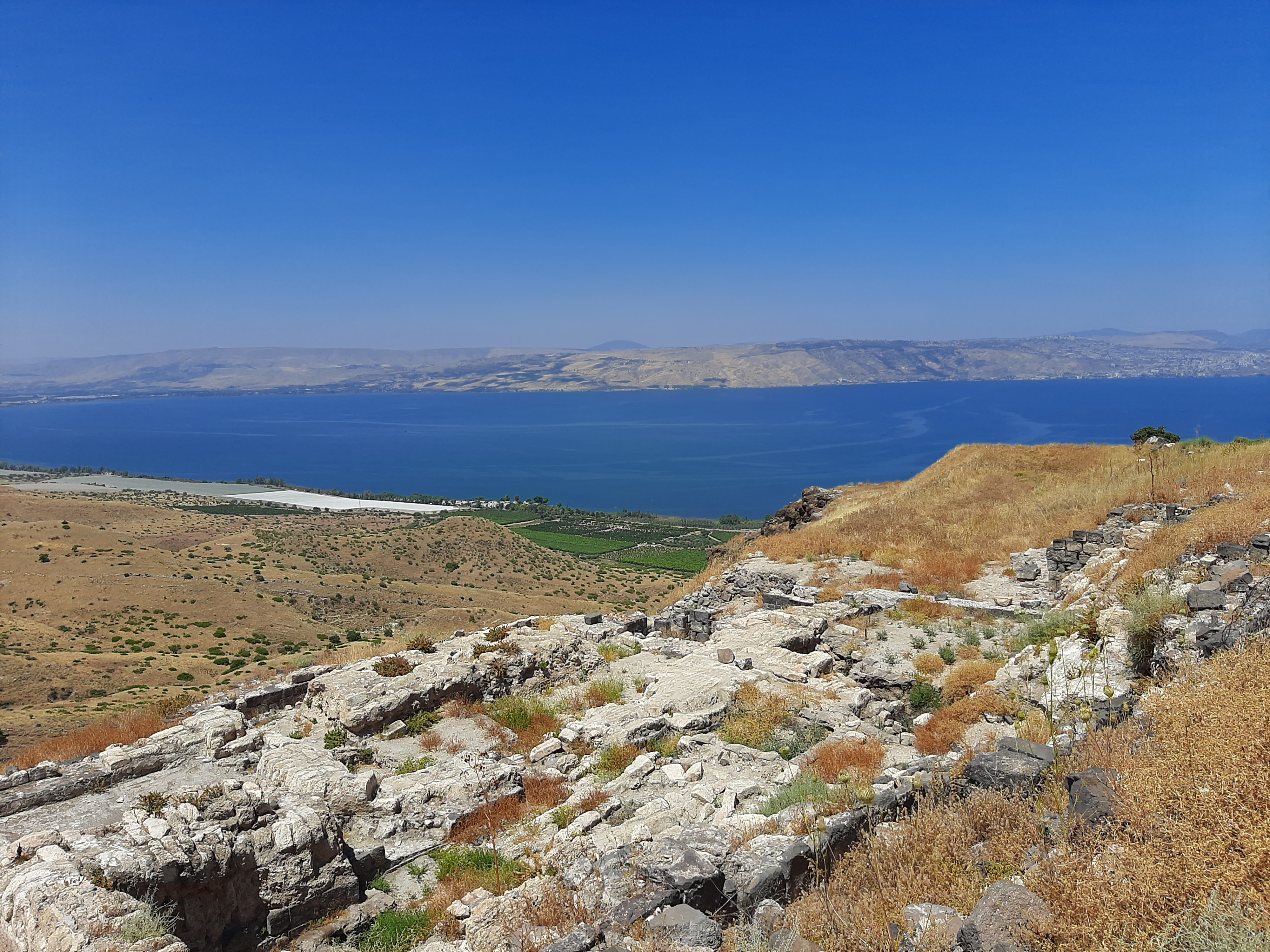 آثار في سوسيتا الحصن هيبوس التقطها بنفسي المستخدم palestine11 في الجولان